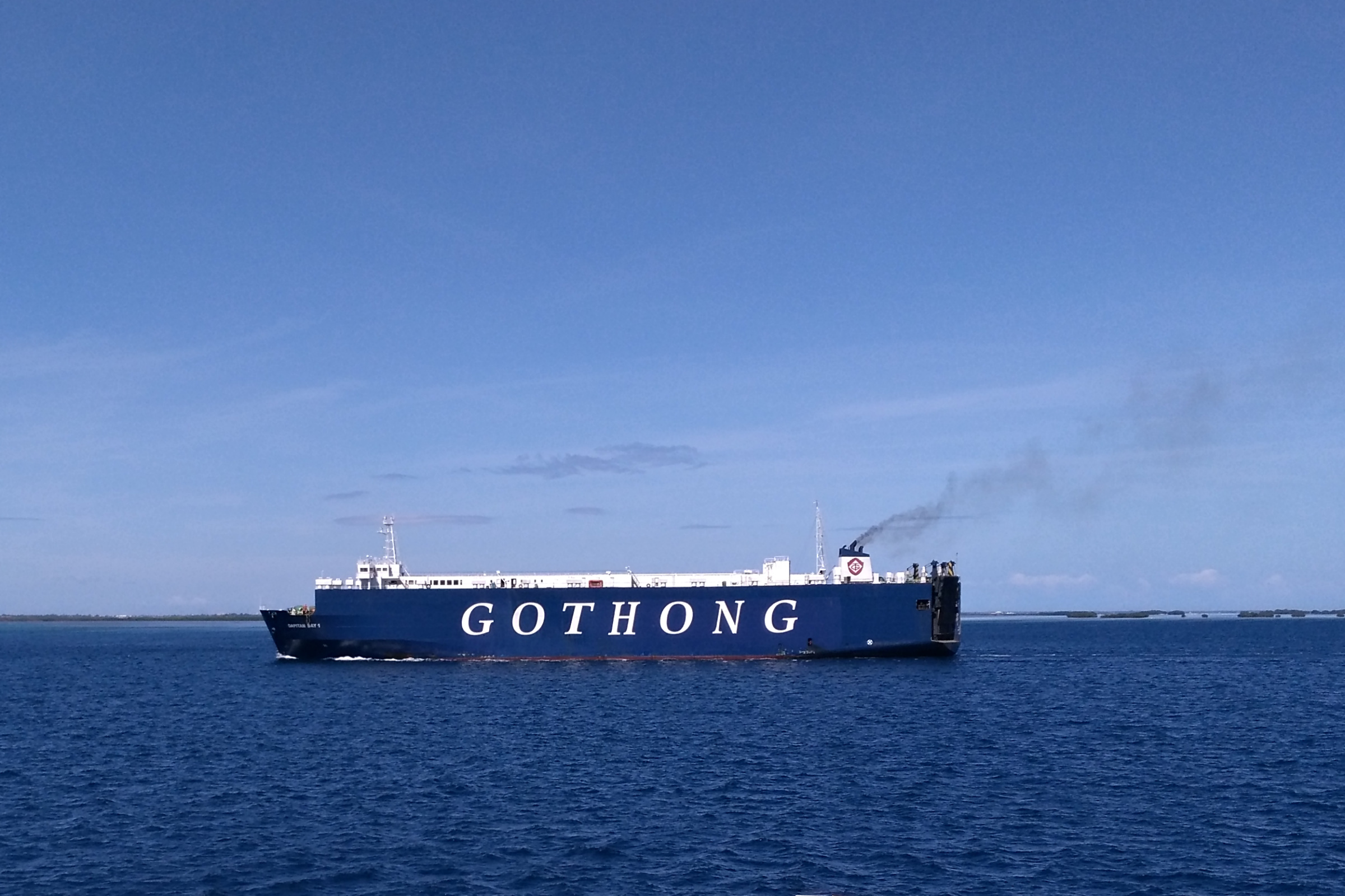 Dapitan Bay 1 of Gothong Lines, Philippines